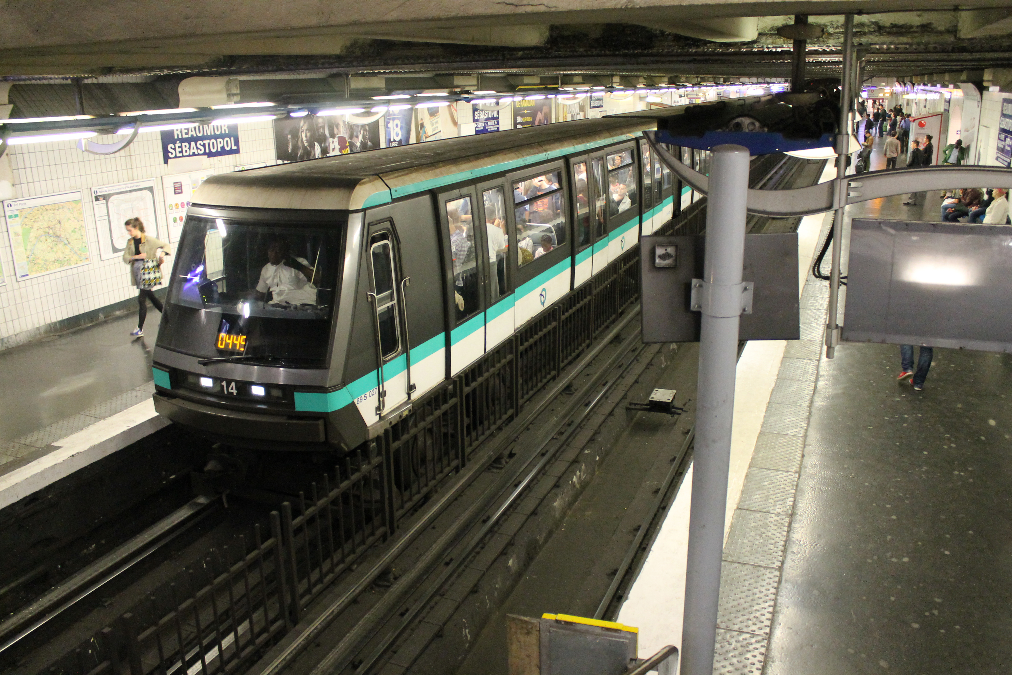 Réaumur - Sébastopol Metro, Paris, France.